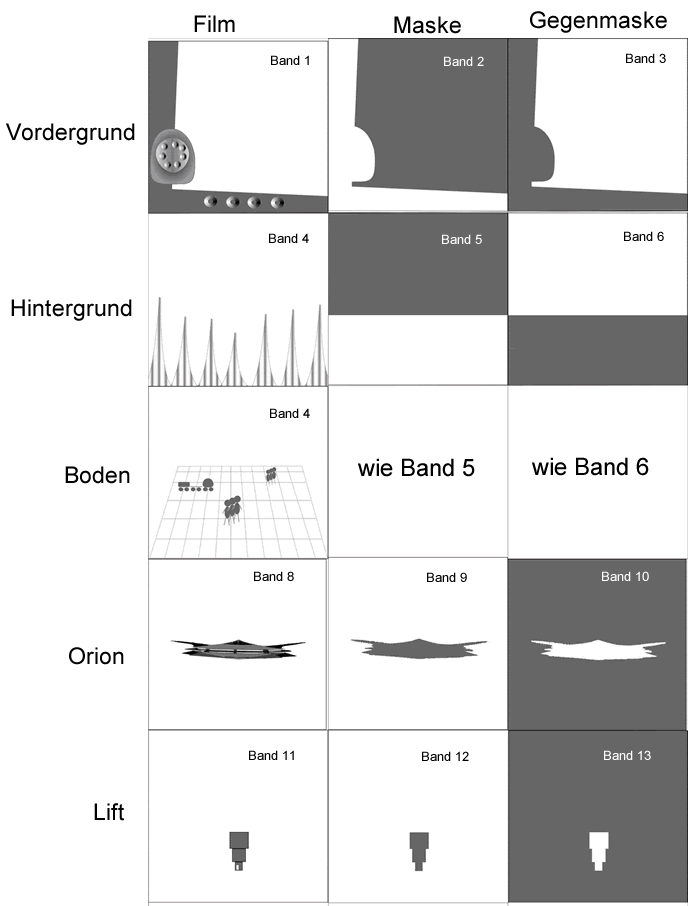 Kopierschema der Szene "Tiefseebasis 104" aus der Fernsehserie "Raumpatrouille"